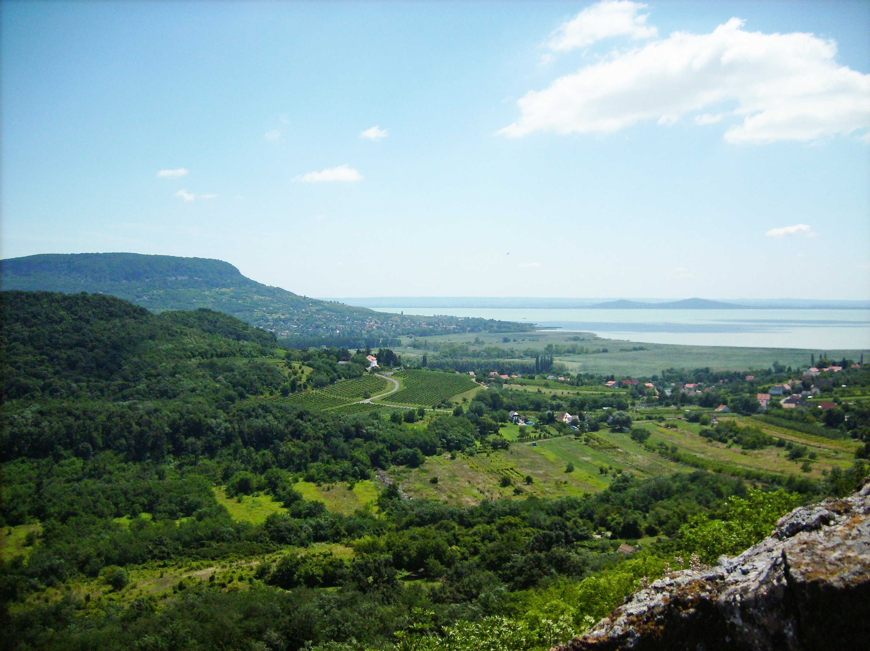 Balaton